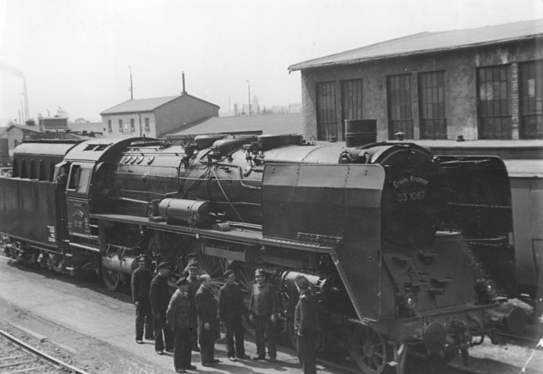 Kohlenstaublok 03 1087 (BR 03) Zentralbild Seidel 12.5.1952 Kohlenstaub-Lok vom RAW "Wilhelm Pieck" übergeben. Das Wendlerkollektiv des RAW "Wilhelm Pieck" in Chemnitz (heute Karl-Marx-Stadt) , hat eine Stromlinienlok, die schon 3 Jahre auf einem Abstellgleis stand und nicht mehr einsatzfähig war, in eine Normallok mit Kohlenstaubfeuerung innerhalb kurzer Zeit umgebaut. Sie soll auf der Strecke Berlin-Stralsund eingesetzt werden. UBz: Die auf den Namen des Reichsbahndirektors Erwin Kramer getaufte Kohlenstaub-Lok.